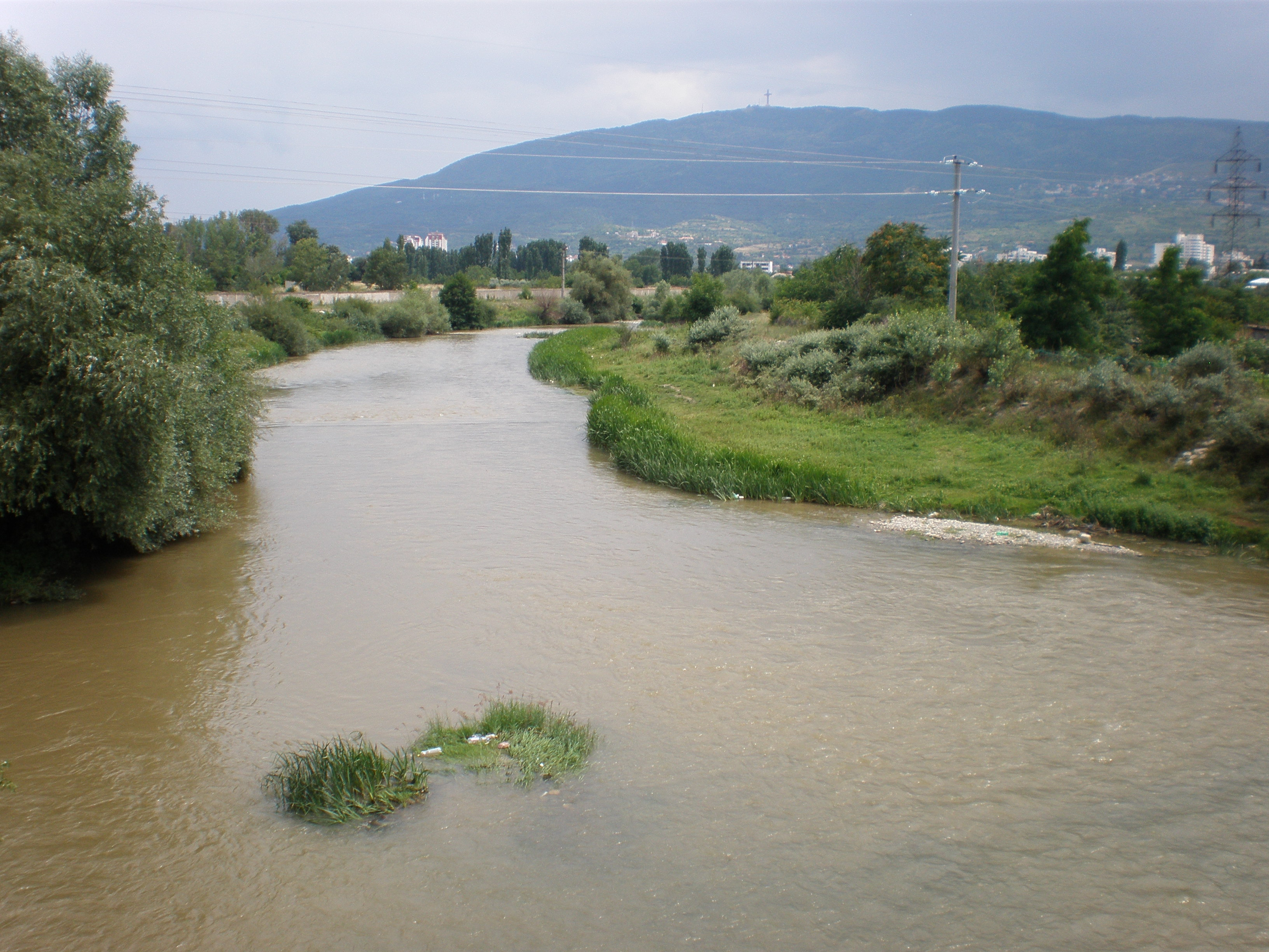 Река Лепенец